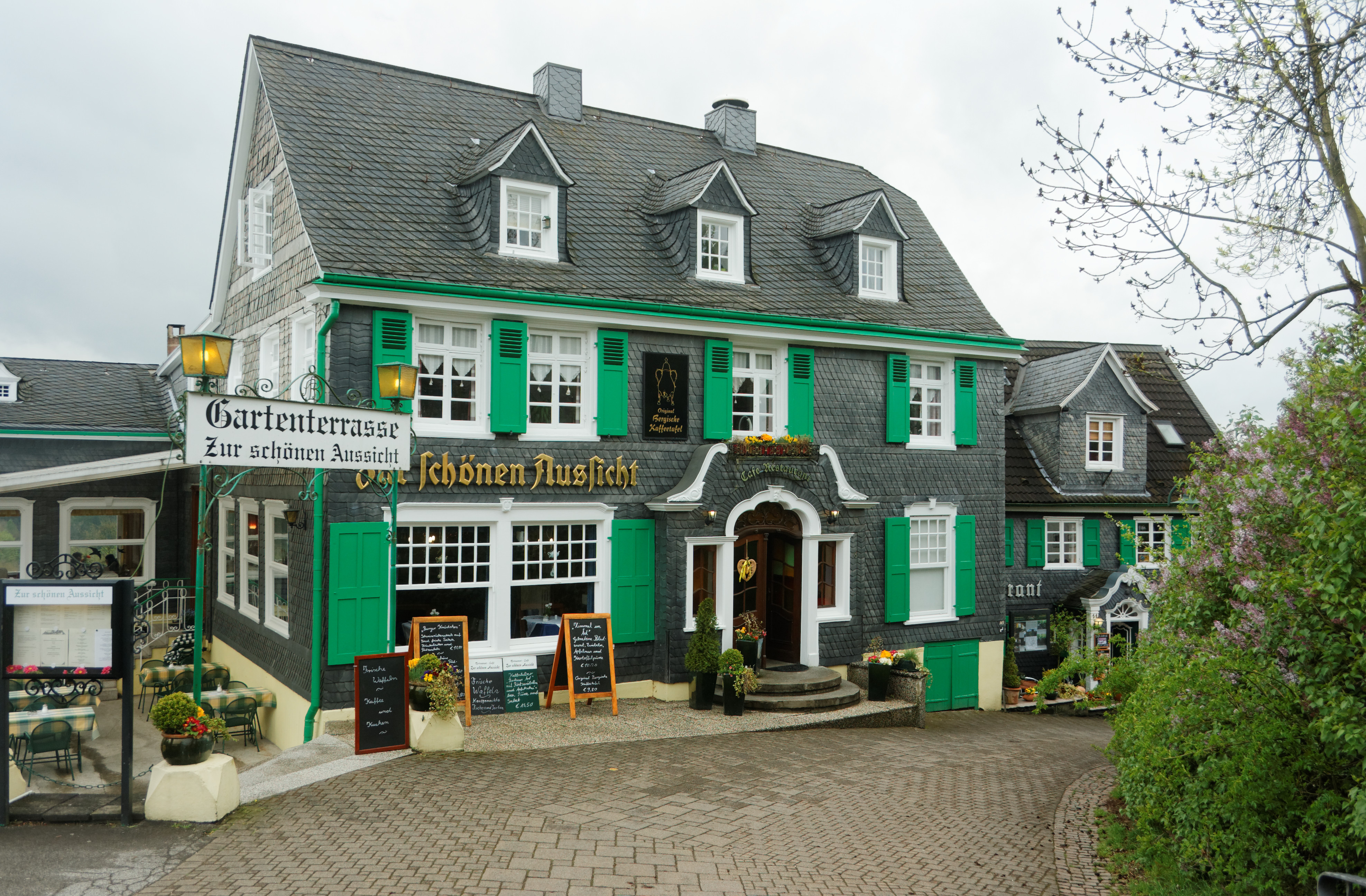 Ausflugslokal nahe Schloß Burg, Schlossplatz 8.